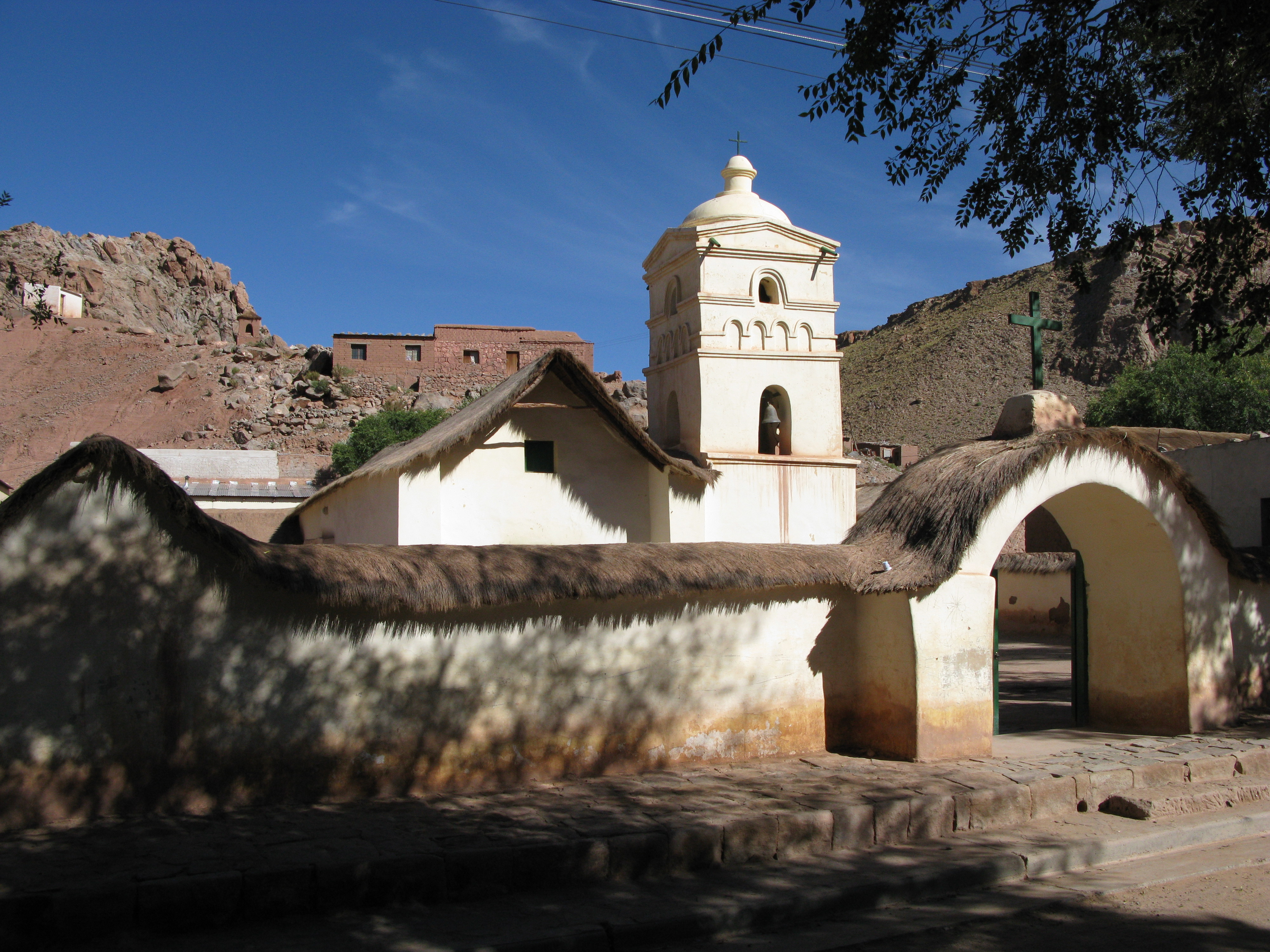 Capila de Susques al amanecer